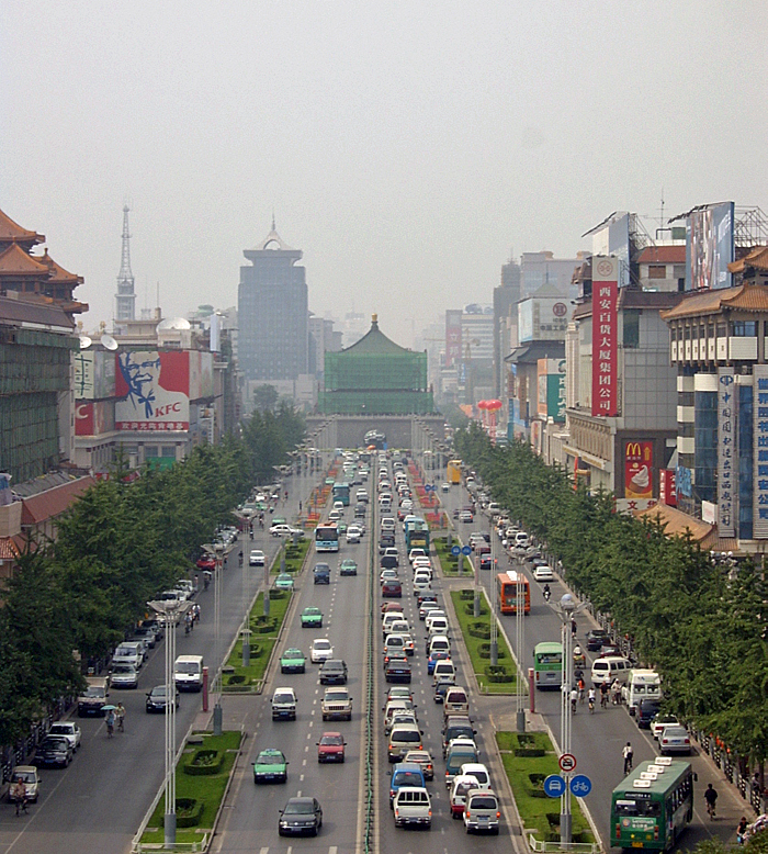 Zentrum von Xi'an (2004)